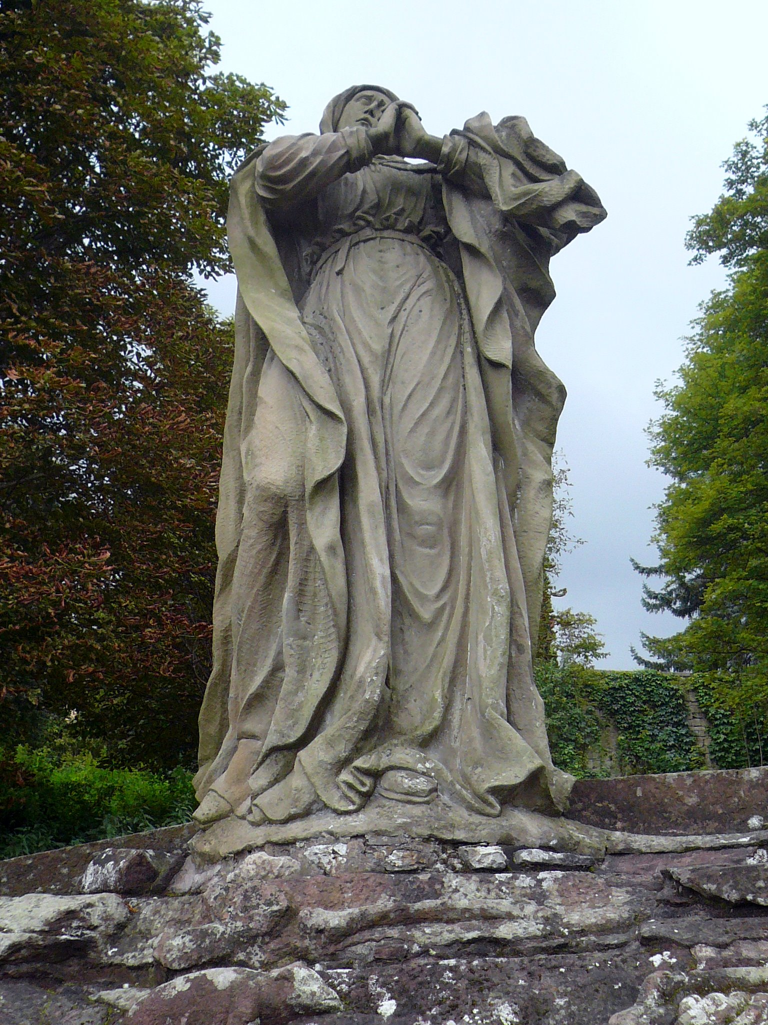 Kapellenkreuzweg Kloster Altstadt, Station 12